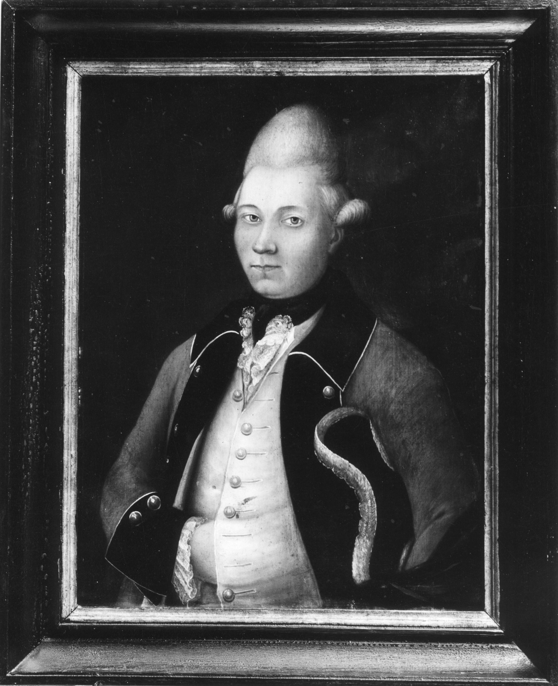 Oljemaleri av Joachim von Wessel, repro av Væring, Norsk portrettarkiv, Riksantikvaren